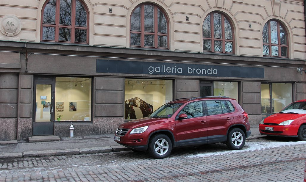 Galleria Bronda on galleristi Kaisu Rehbinderin vuonna 1978 perustama helsinkiläinen taidegalleria.